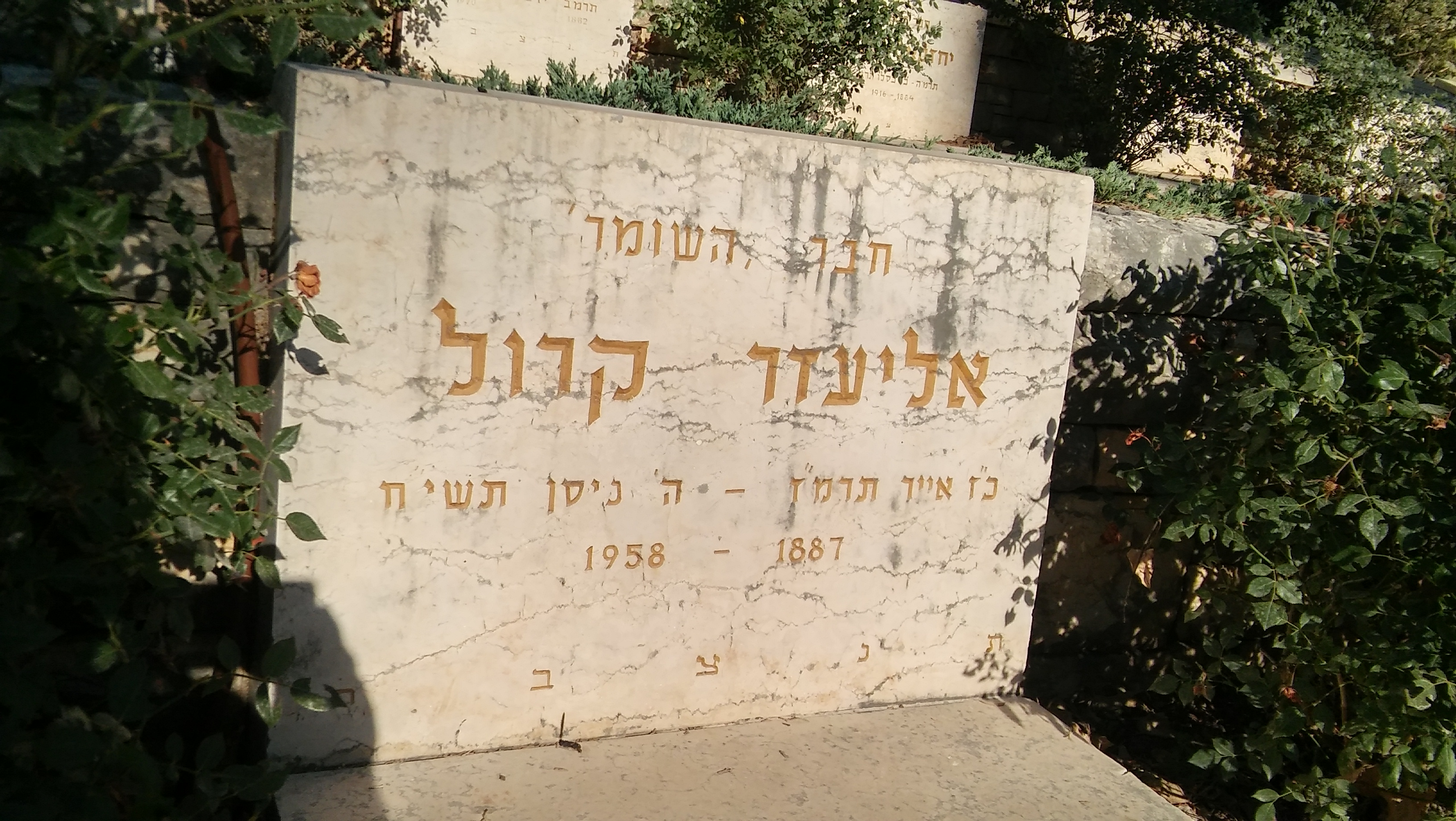 קברו של אחיעזר קרול בחלקת השומר בבית הקברות של כפר גלעדי